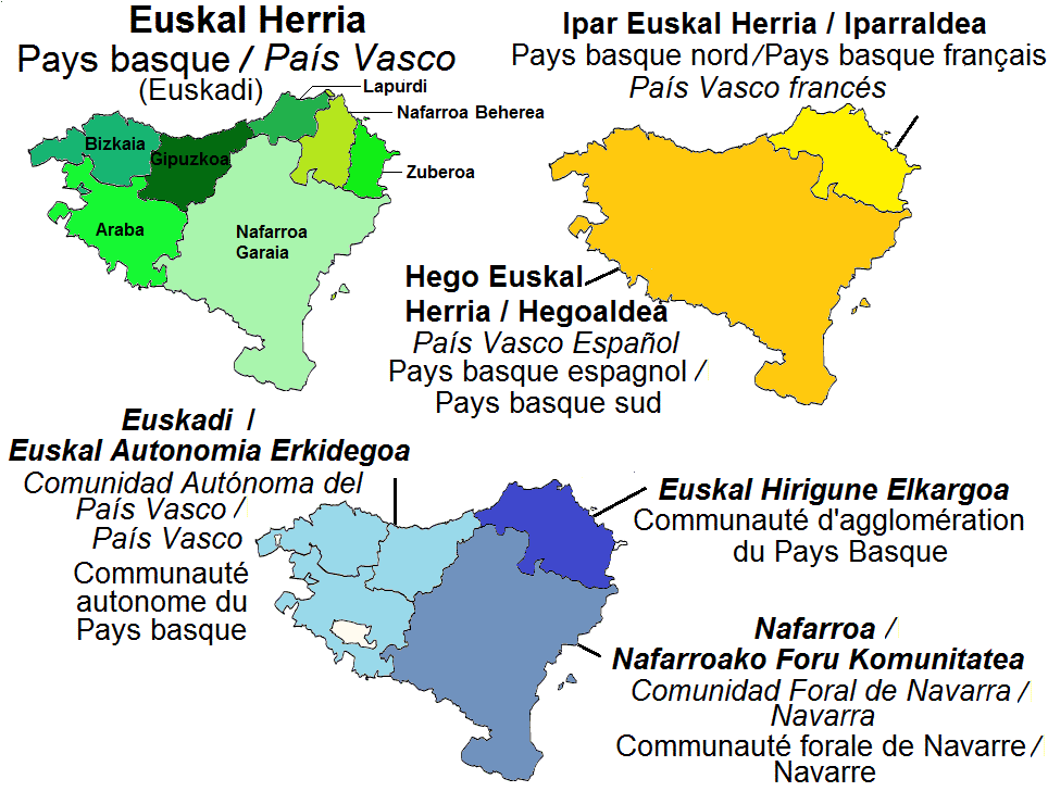 Euskal Herriaren deitura desberdinak izendatzeko terminologiak dira